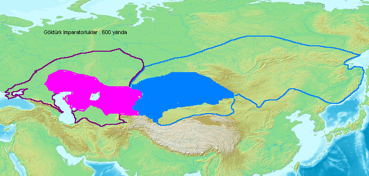 kendim--Zentukmesaj 12:38, 20 Ocak 2007 (UTC)